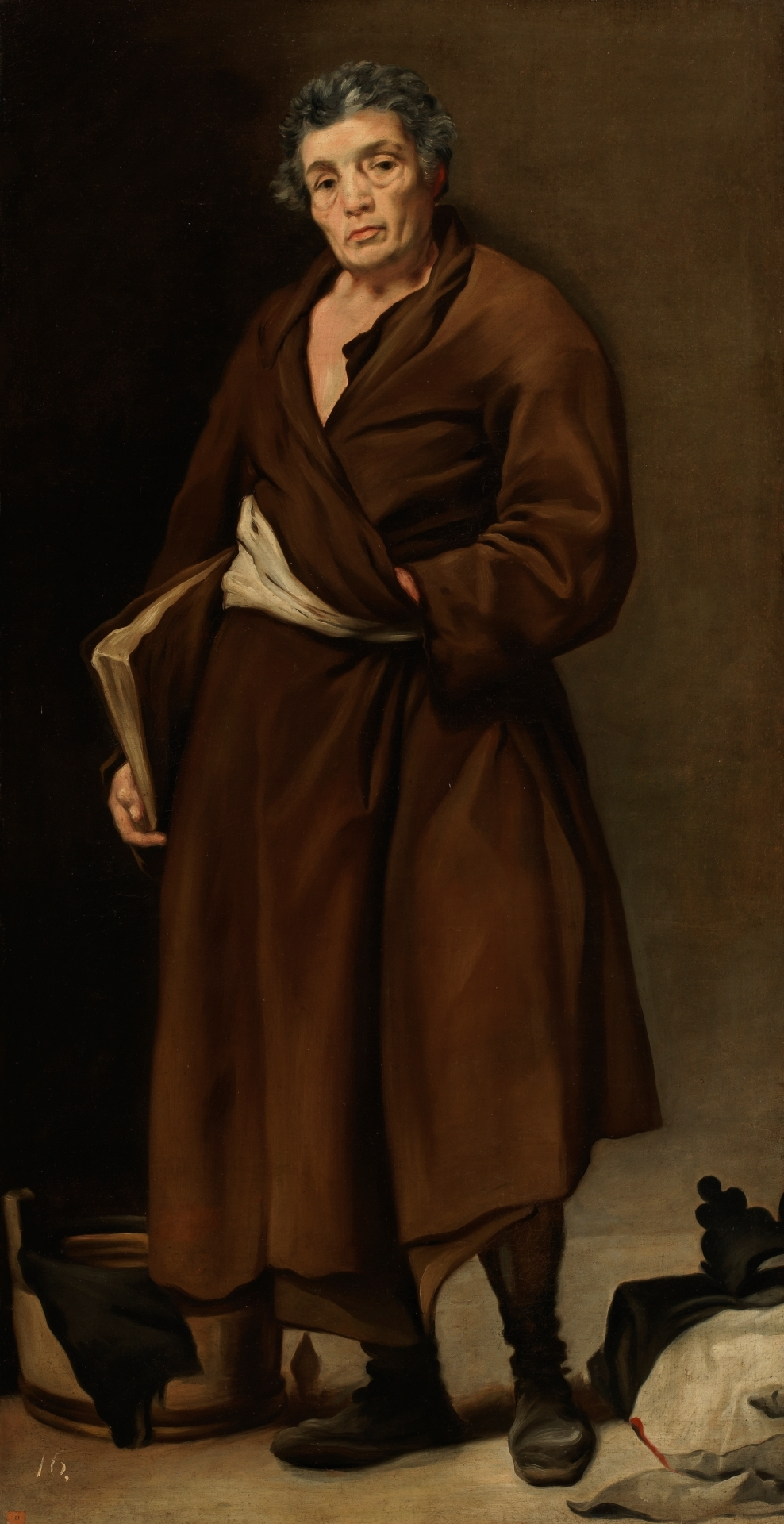 La obra representa al fabulista griego Esopo, y es una copia de la obra homónima de Diego Velázquez conservada también en el Museo del Prado.